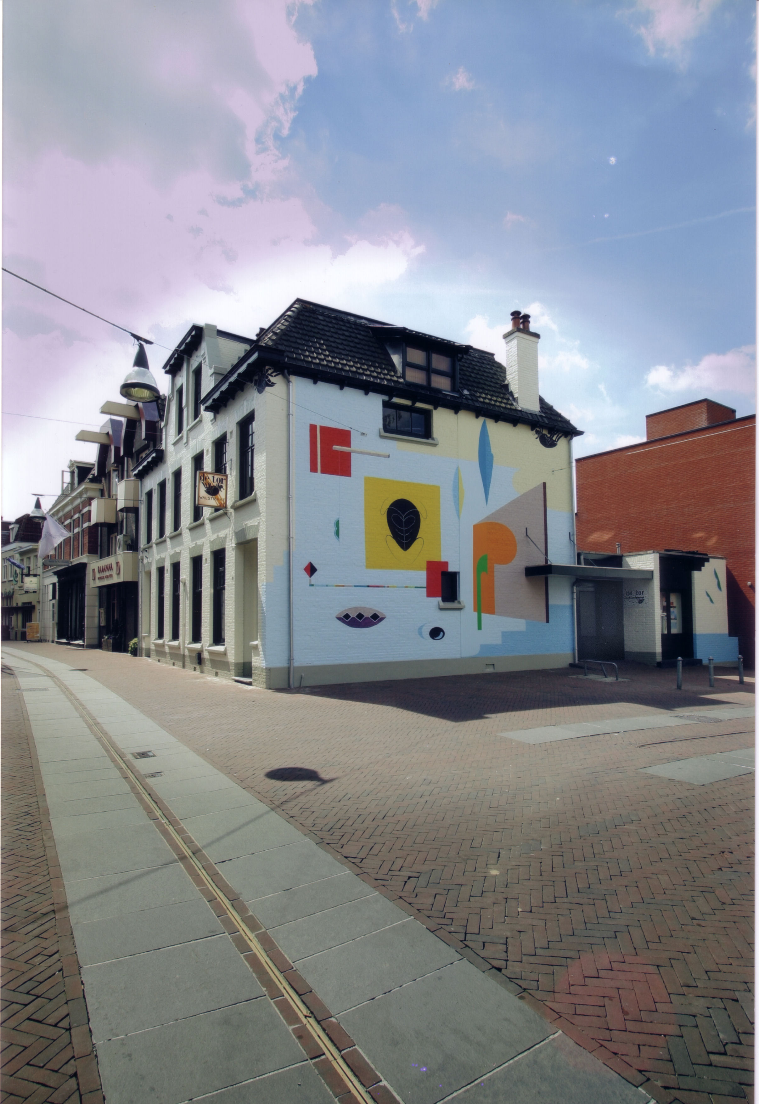 Societeit de Tor - Enschede